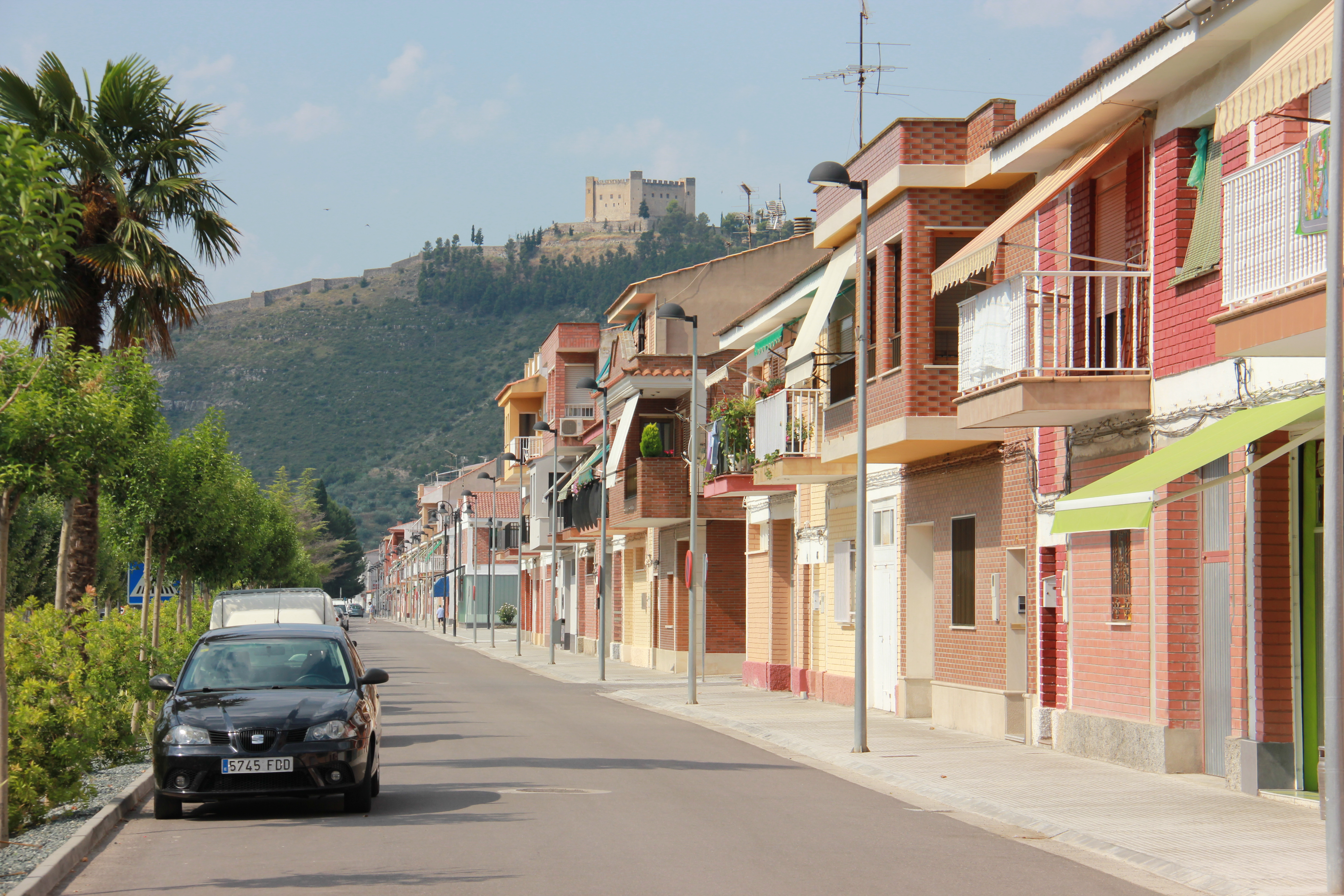 Мекиненса